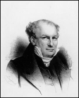 Jean Raikem, ministre de la Justice belge